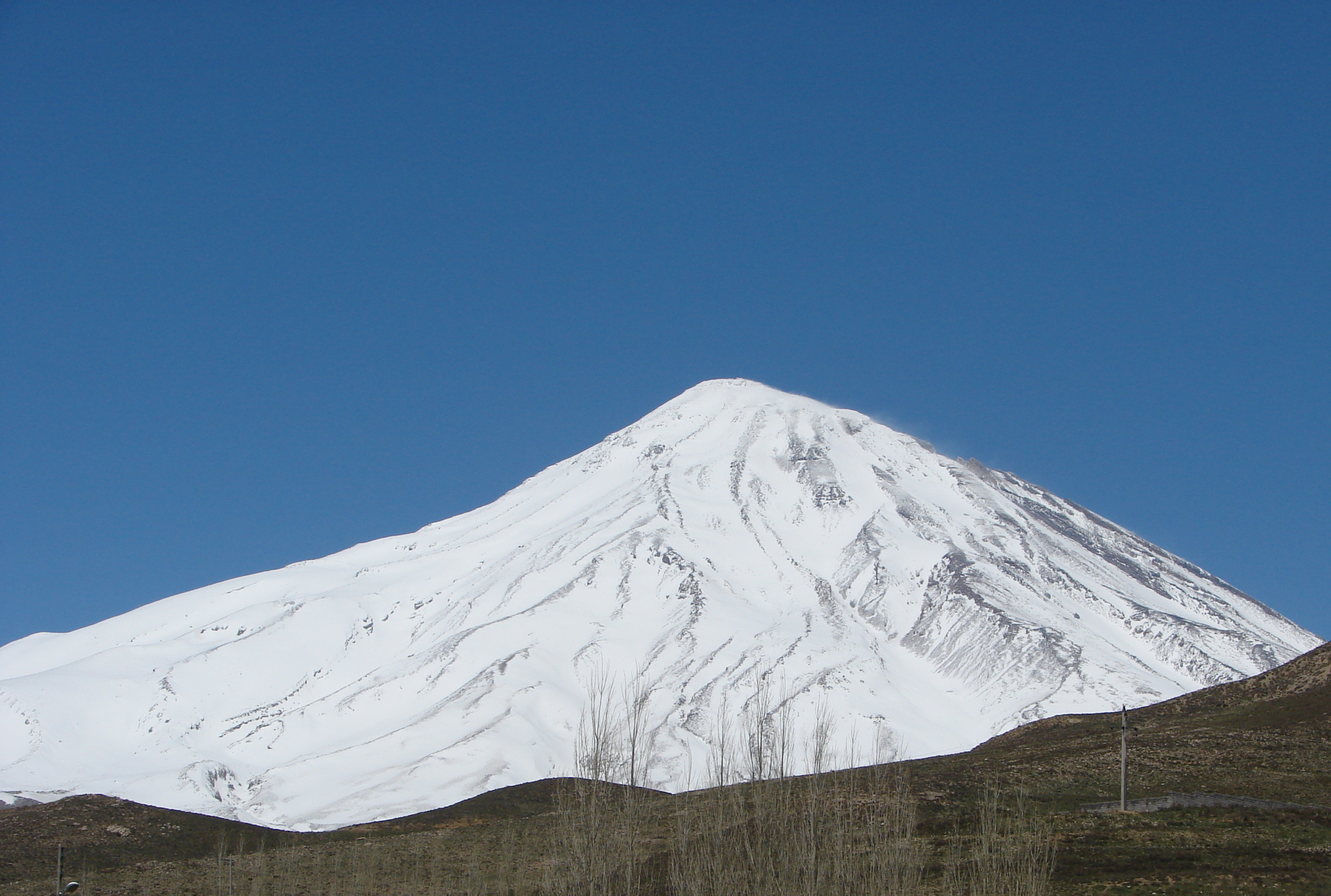 Mount Damavand